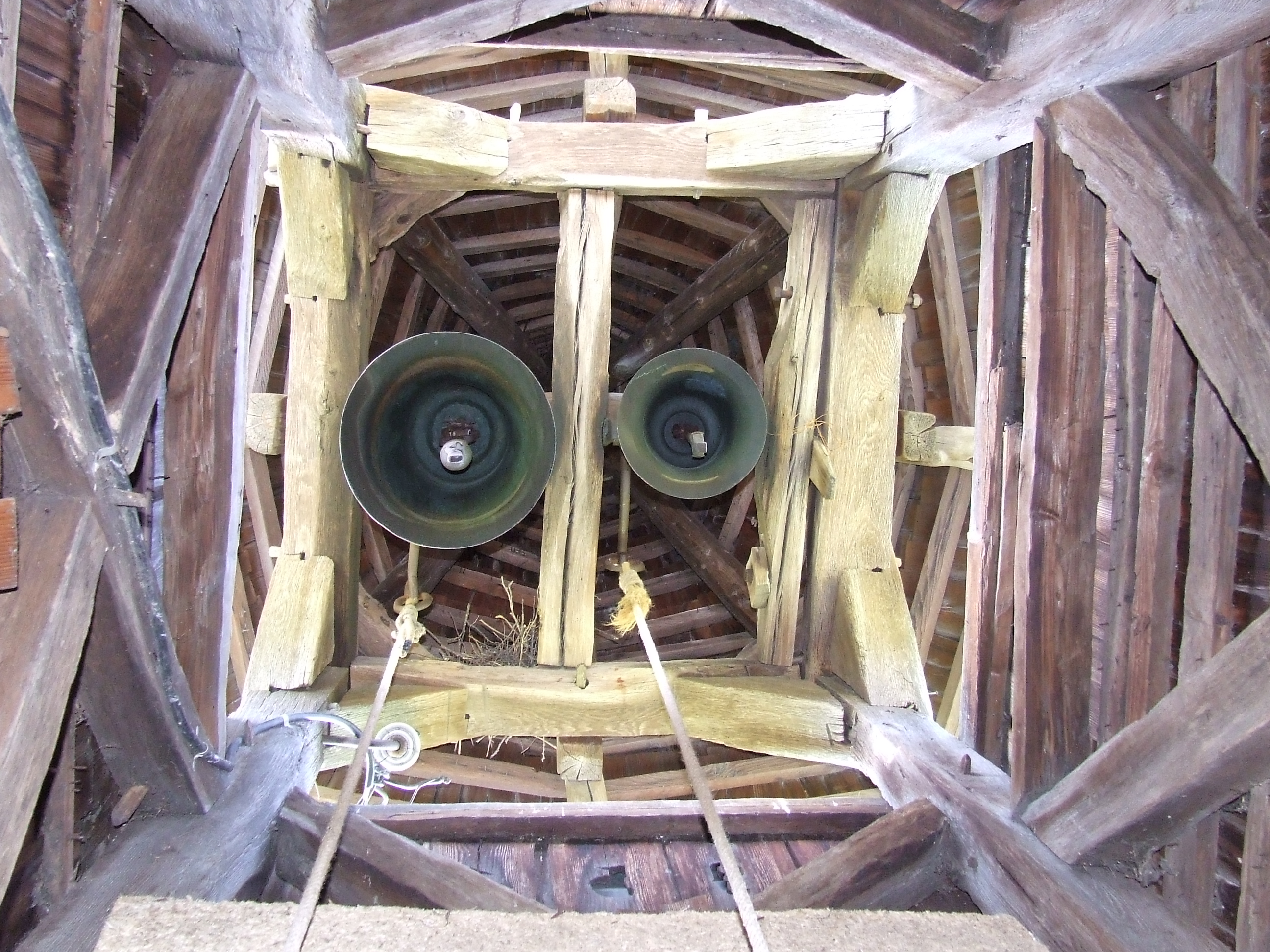 Biserica de lemn din Sumurducu. Clopotele.